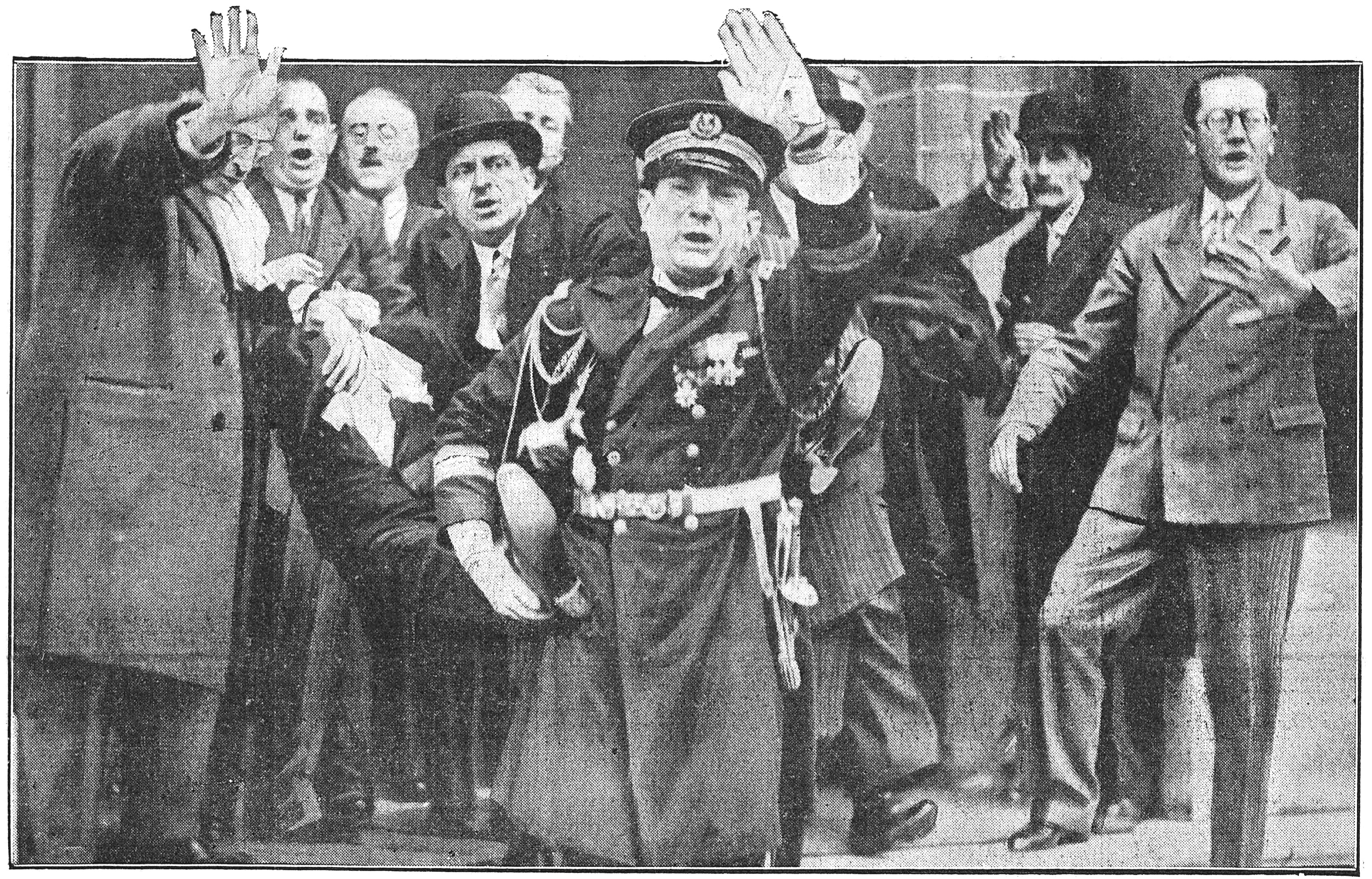 "Le président de la République est transporté dans son automobile".